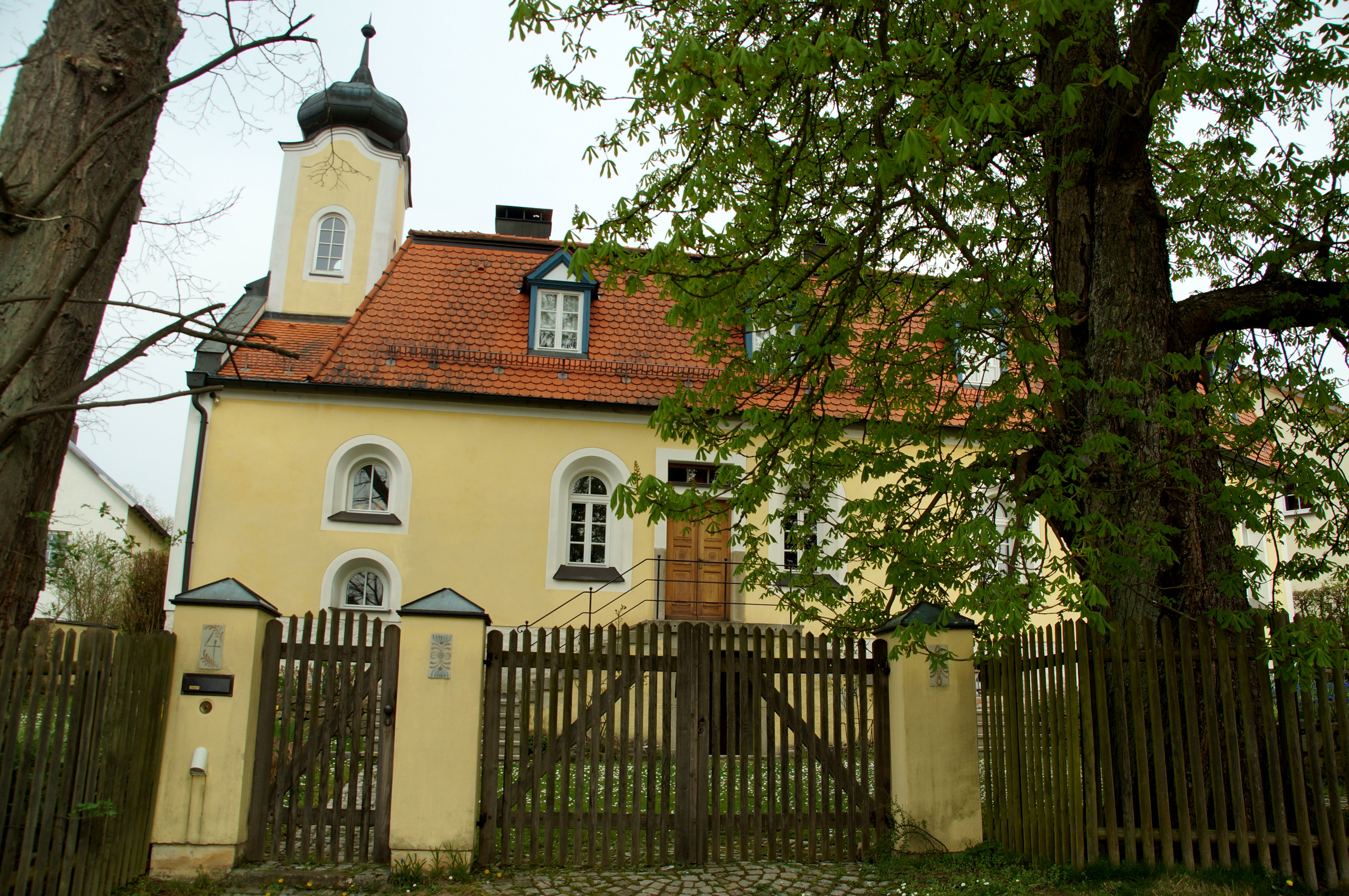 Ehem. Schlosskapelle Hl. Kreuz, profaniert, eingeschossiger Mansardwaldmbau mit Apsis und Dachreiter mit Zwiebelhaube, 17. Jahrhundert, Anbau 1954